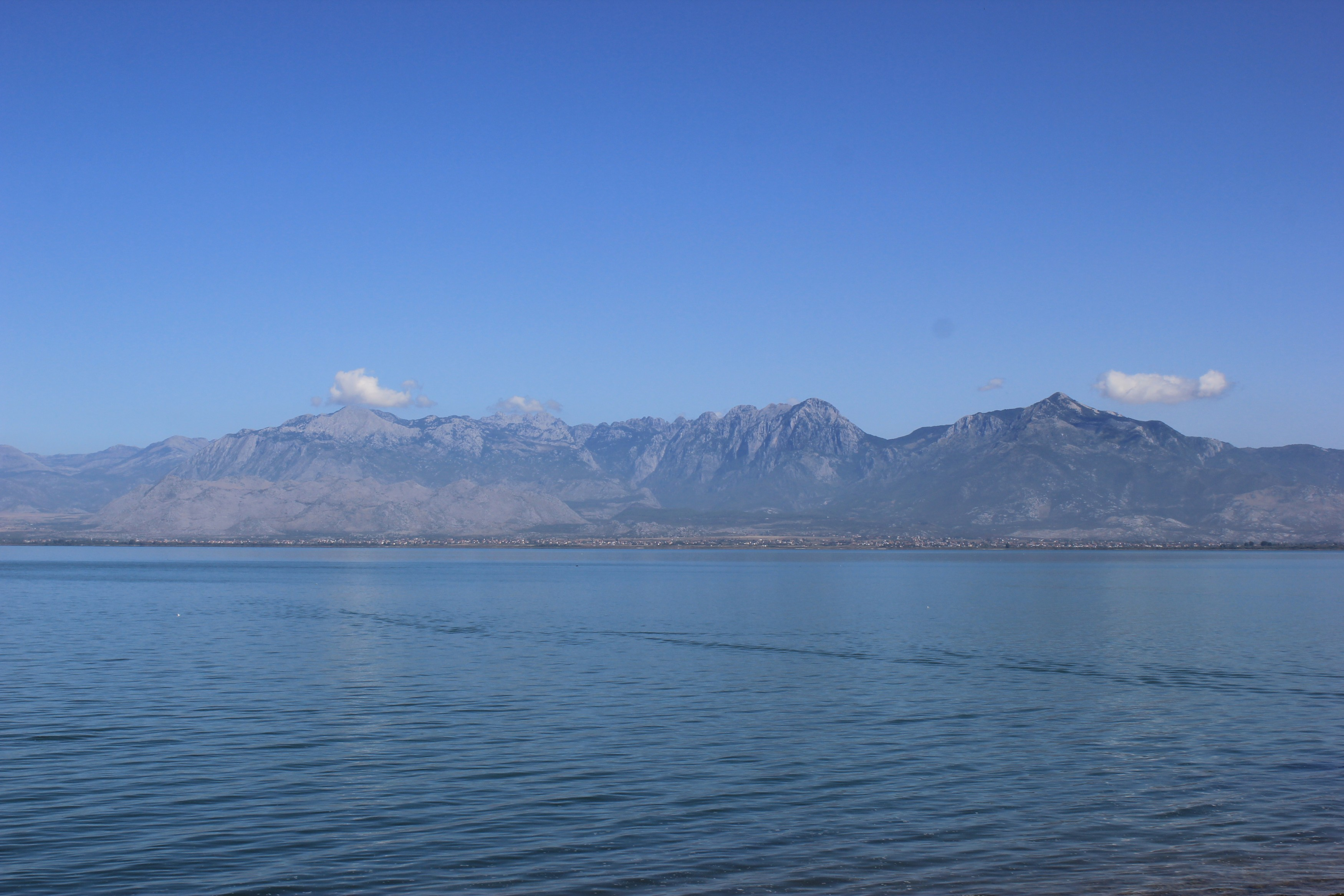 Blick über den Skutarisee bei Zogaj, Albanien.